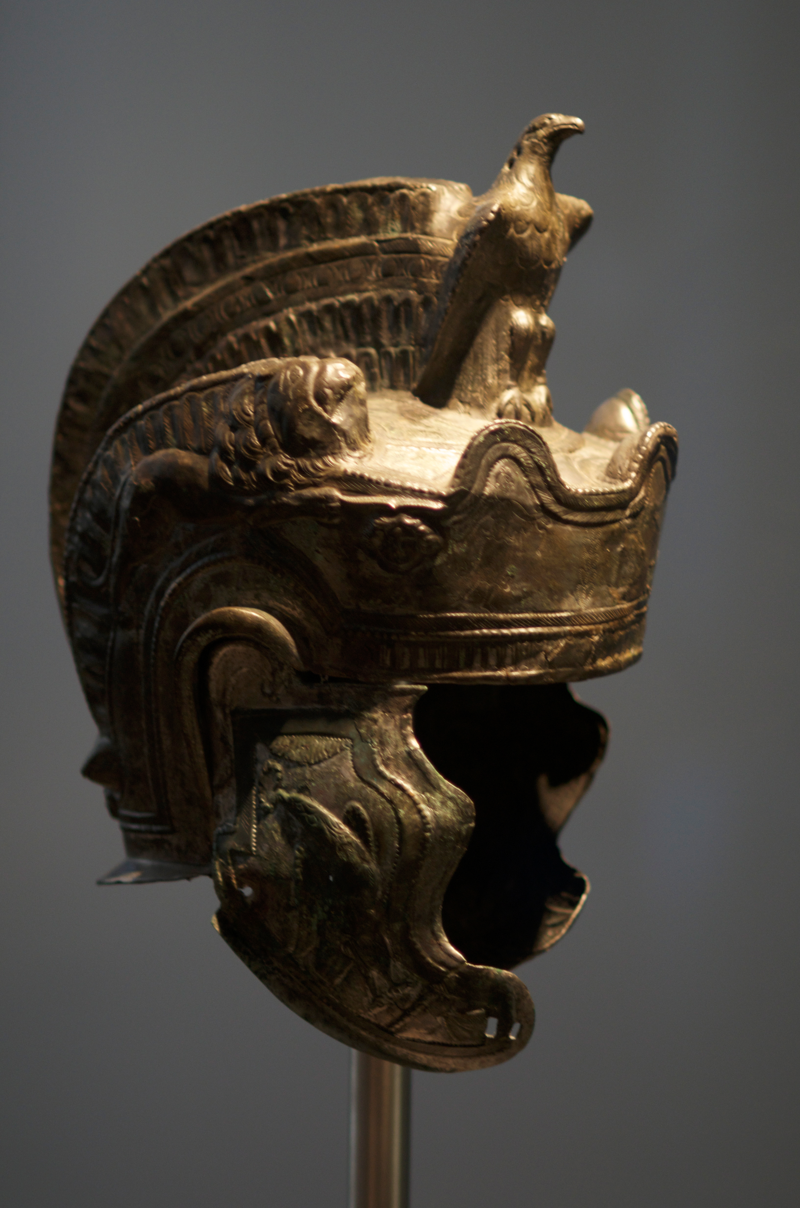 Römischer Paradehelm, um 150/200 n.Chr., Germanisches Nationalmuseum Nürnberg